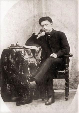 Я.Маўр – памочнік настаўніка пачатковай школы ў мястэчку Новае Места (Літва) 1905 г.